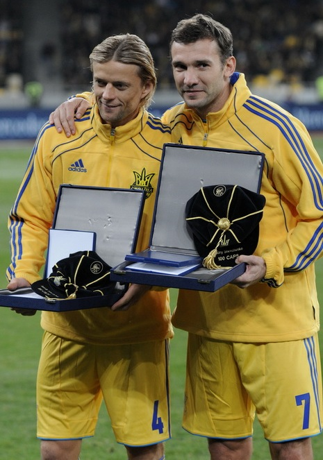 Андрій Шевченко та Анатолій Тимощук з призами від УЄФА за 100 матчів в збірній